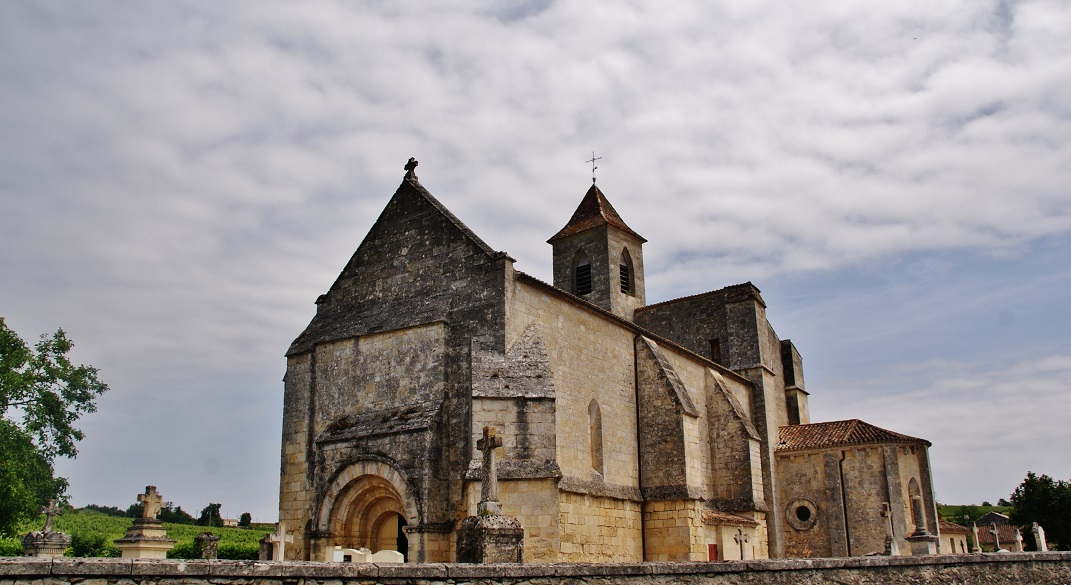 église St Etienne